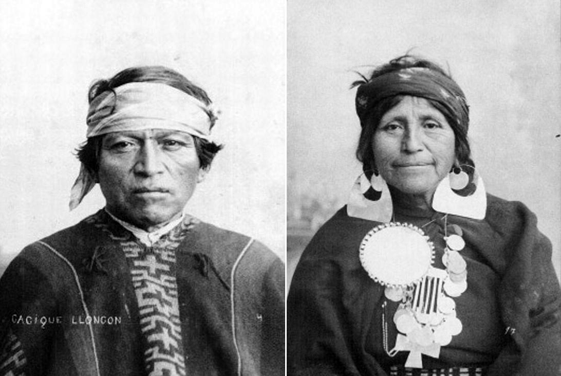 Hombre y mujer Mapuche circa 1890.